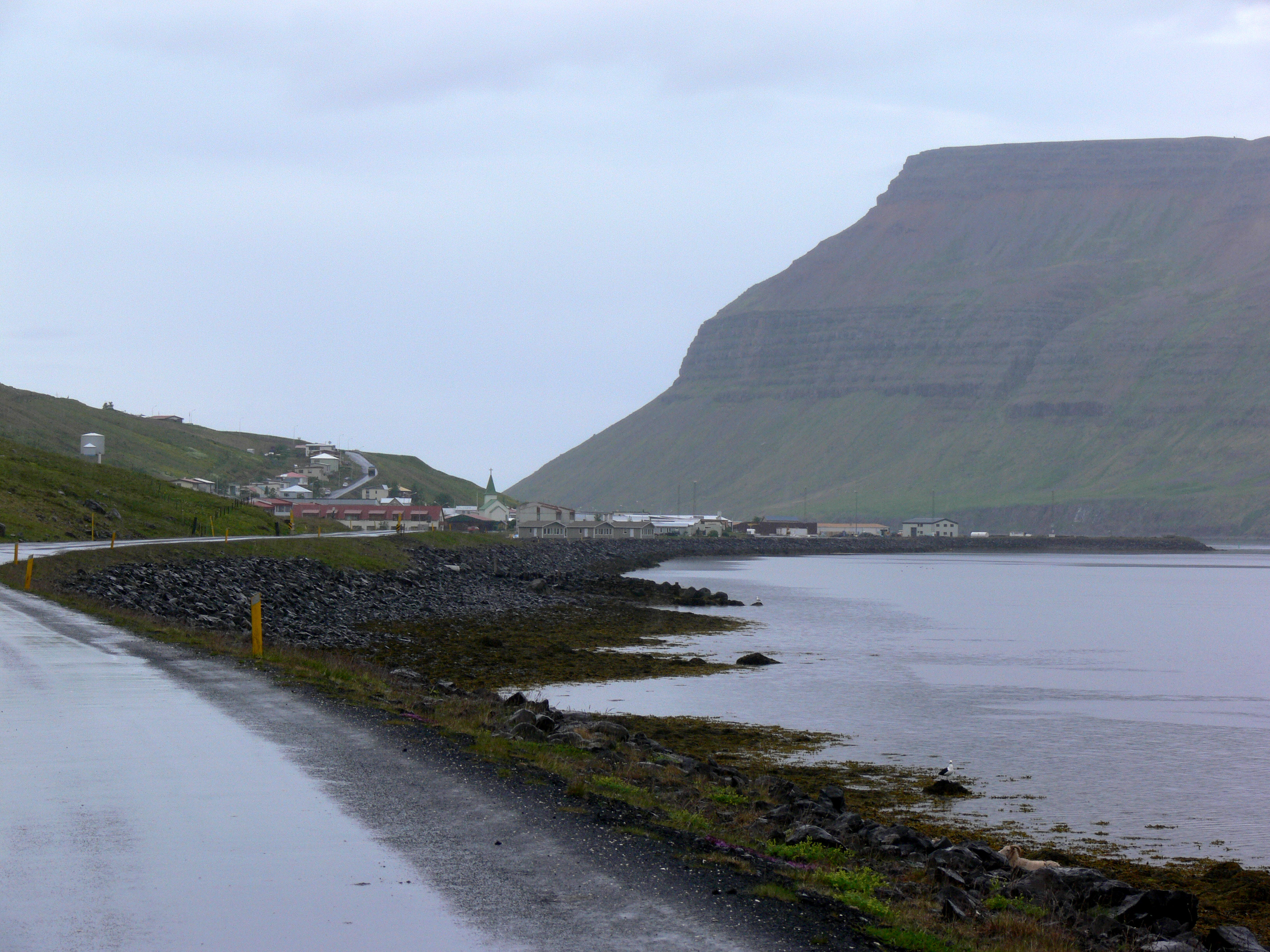 Suðureyri. Dahinter der Berg Góltur.